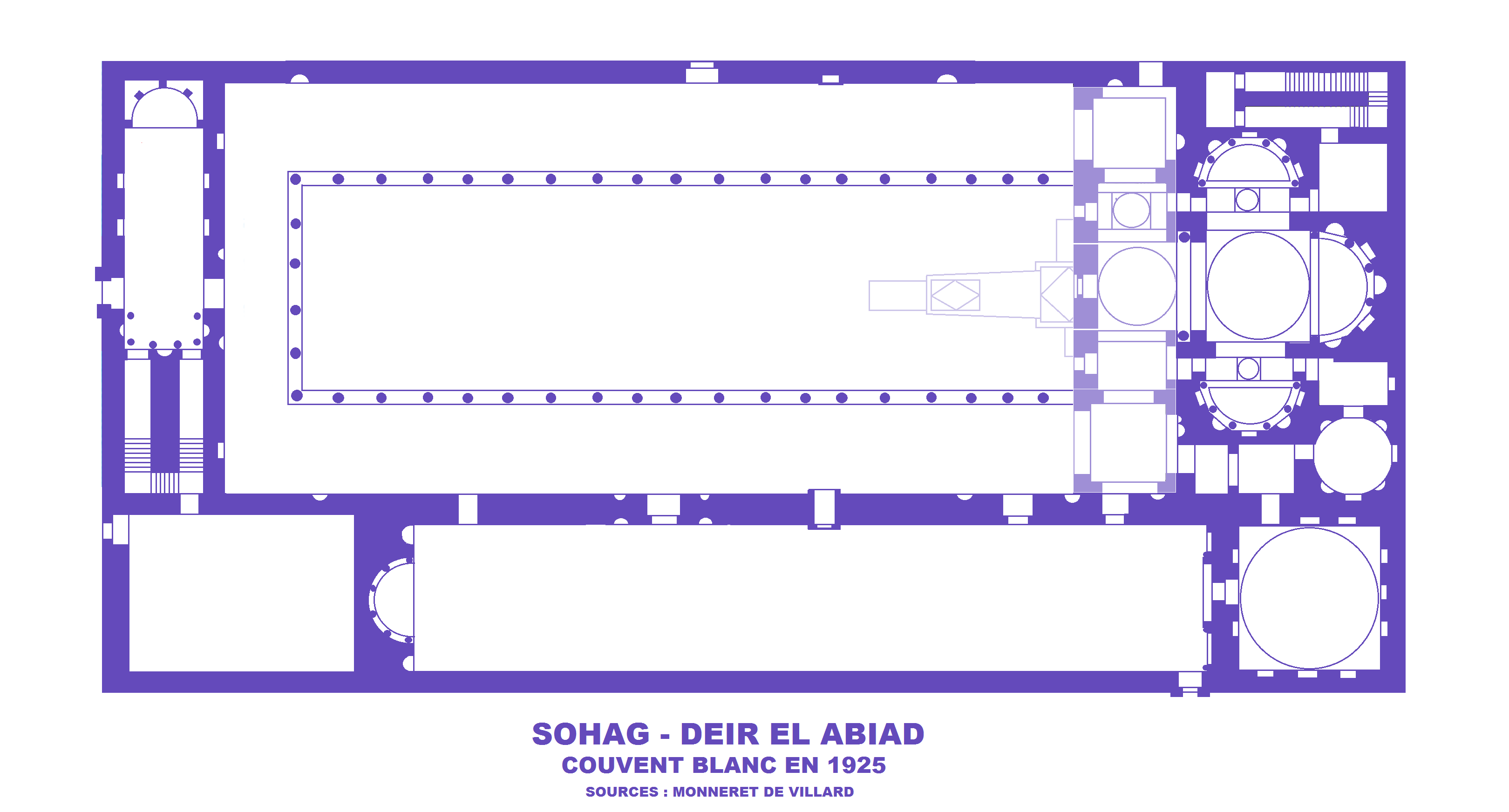 Sohag, Couvent Blanc, Plan